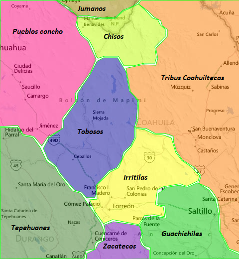 Extención territorial de algunas etnias del oeste de Coahuila, México al contacto con los españoles en el siglo XVI.